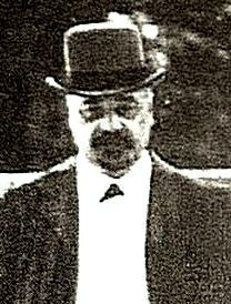 Деятель российского политического сыска Пётр Иванович Рачковский (1851-1910)